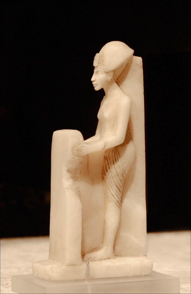 Statuette d'Akhenaton tenant une stèle sans inscription Nouveau Royaume, 18ème Dynastie 1350 av.JC Amarna, Egypte Albatre Neues Museum Période d'Amarna Musée égyptien Donation James Simon, 1920 Site du musée La collection du Neues Museum présente en particulier les trésors trouvés à Amarna, la capitale d'Aménophis IV Akhenaton, le pharaon hérétique. les archéologues allemands fouillèrent le site entre 1911 et 1914, en privilégiant les maisons particulières. Ce choix se révèla payant, car de nombreux objets y avaient été laissés. Cette découverte constitue une rupture dans la continuité millénaire de l'art de l'Egypte ancienne. extrait du site en français voir aussi le musée du Caire